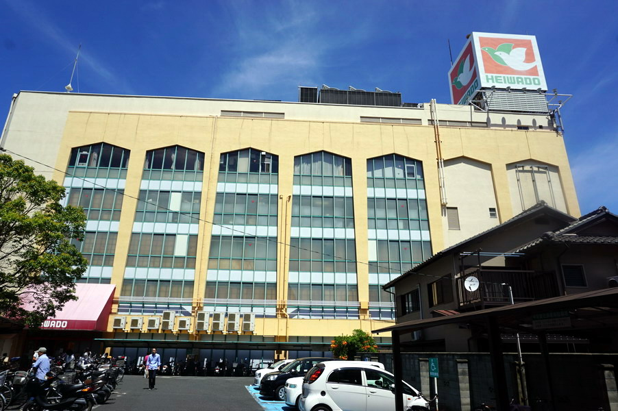 平和堂石山店（2018年8月閉店） Sony ILCE-6000